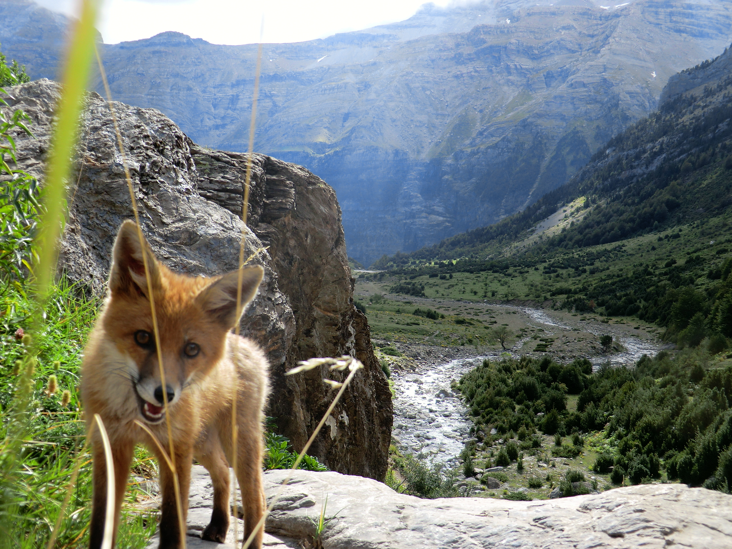 Visita de un zorro en la Valle de Pineta (Aragón) This is a photography of a Site of Community Importance in Spain with the ID: ES2410019. Natura2000 entry, EEA entry